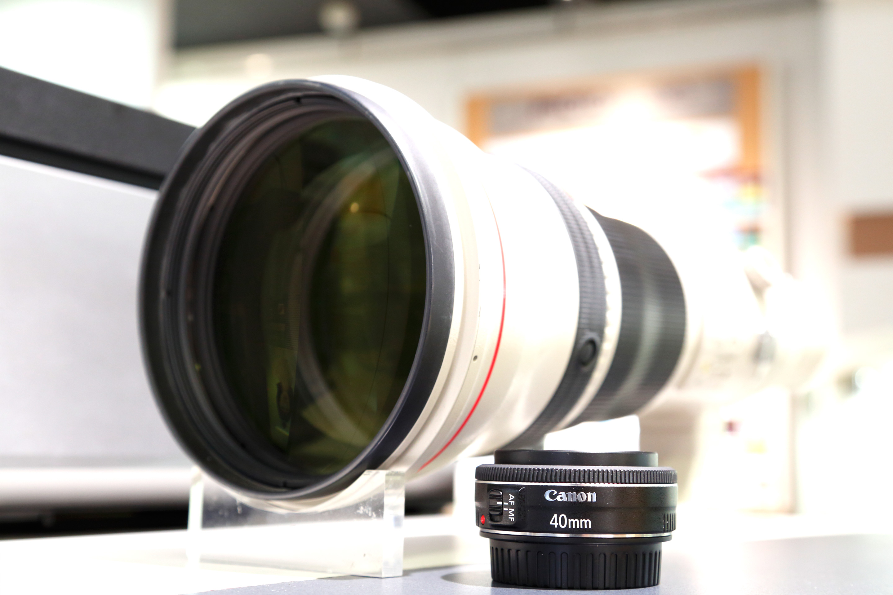 キヤノンEFマウントレンズのうち、2016年現在最大のEF800㎜F5.6L IS USMと最小クラスのEF40mm F2.8 STMの並び。 キヤノン銀座ショールームにて。